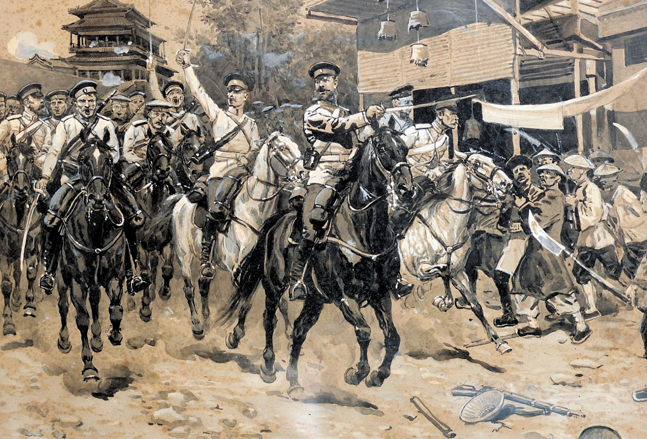 Русская кавалерия в Китае при подавлении Ихэтуаньского восстания